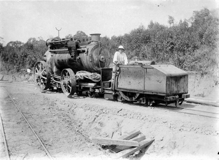 Negatief. Transportmiddel van de Singkep Tin Maatschappij, Riouw